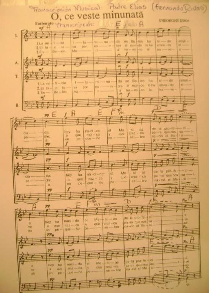 Partitura de la obra "La noticia iluminada" (en rumano: O, ce veste minunta) obra del compositor Gheorghe Dima (en 1888)